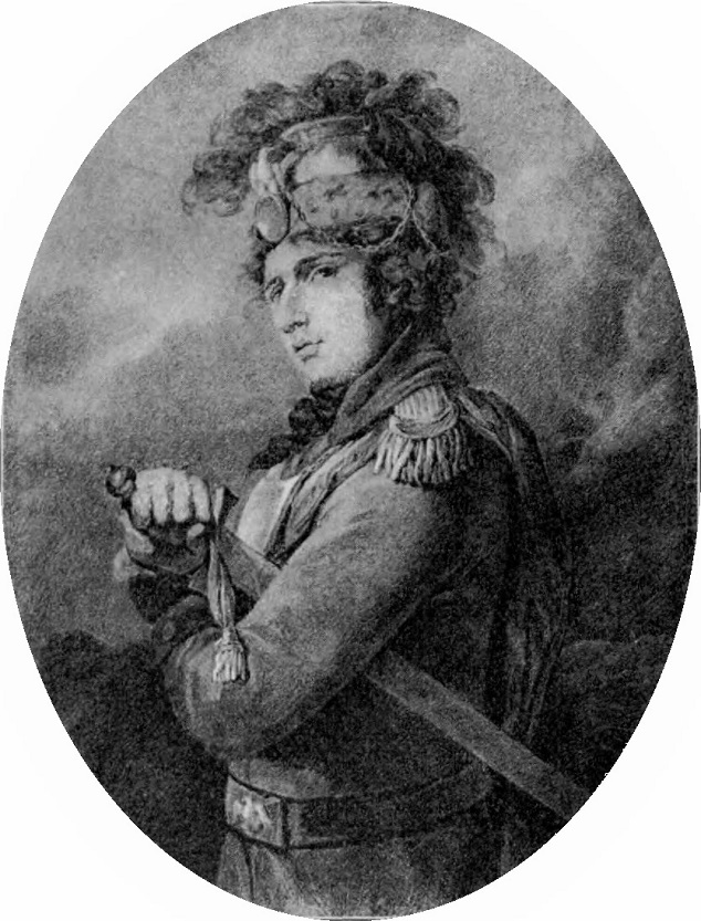 Antoni Radziwiłł